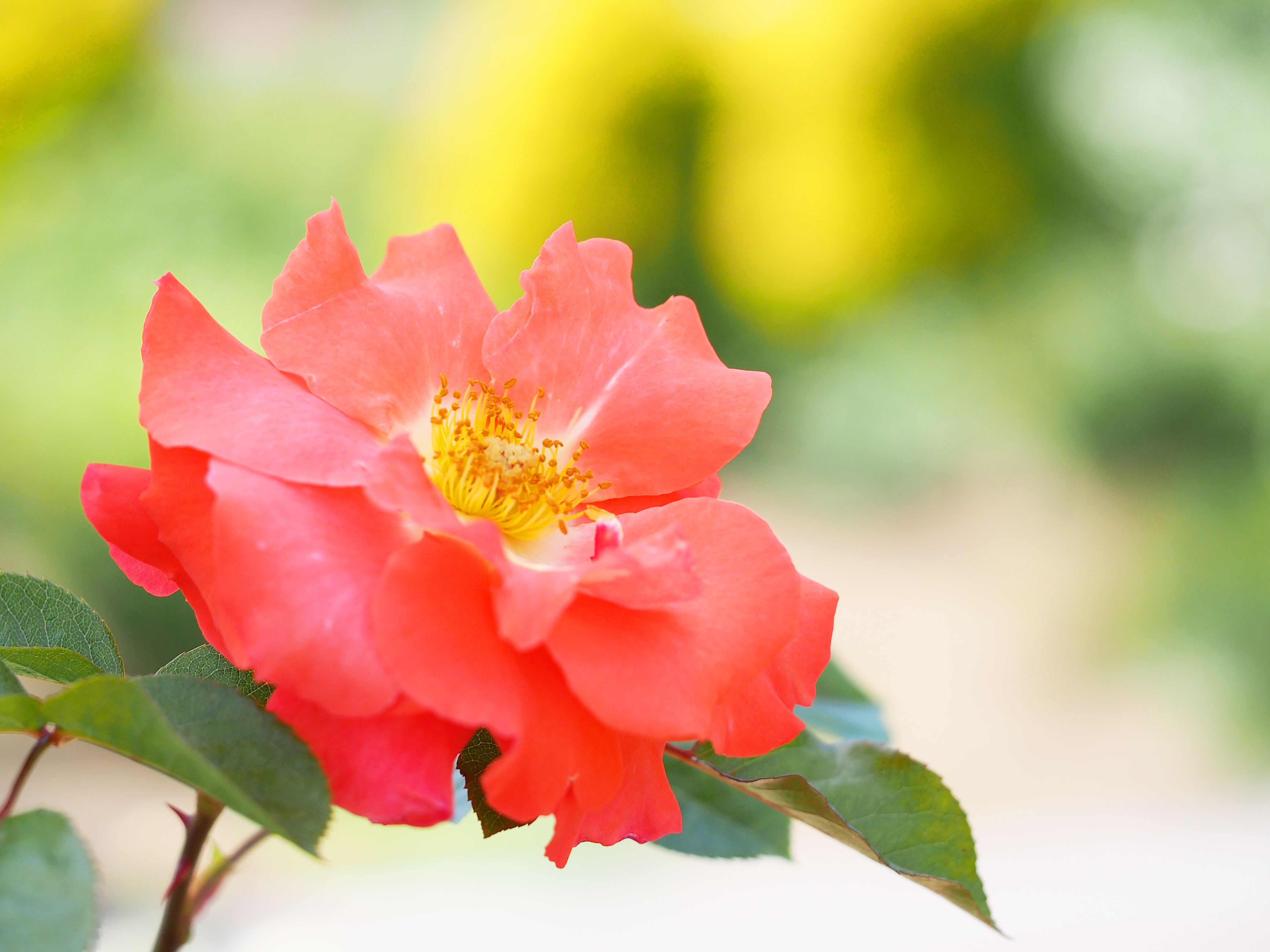 Rose, Jacqueline Nebout, バラ, ジャクリーヌ ヌブー Floribunda rose フロリバンダ France フランス Meilland 1989